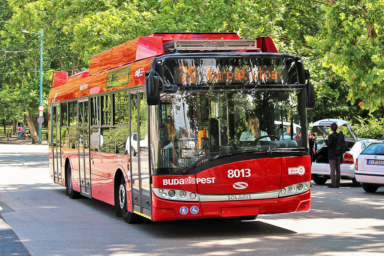 Solaris–Škoda Trollino 12 (psz. 8013) típusú trolibusz a 79-es vonalon